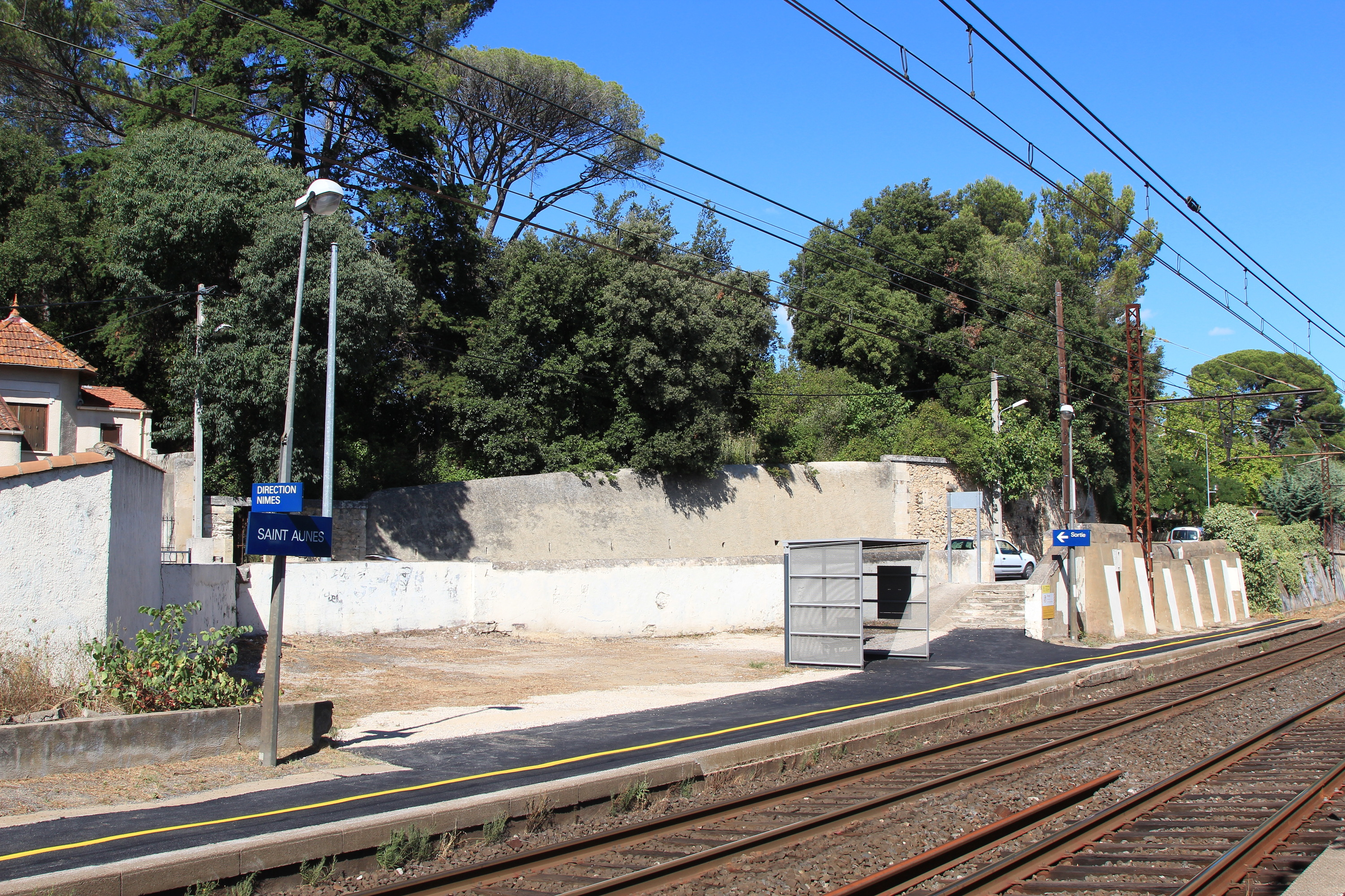 Vue du quai direction Nîmes en gare de Saint-Aunès.